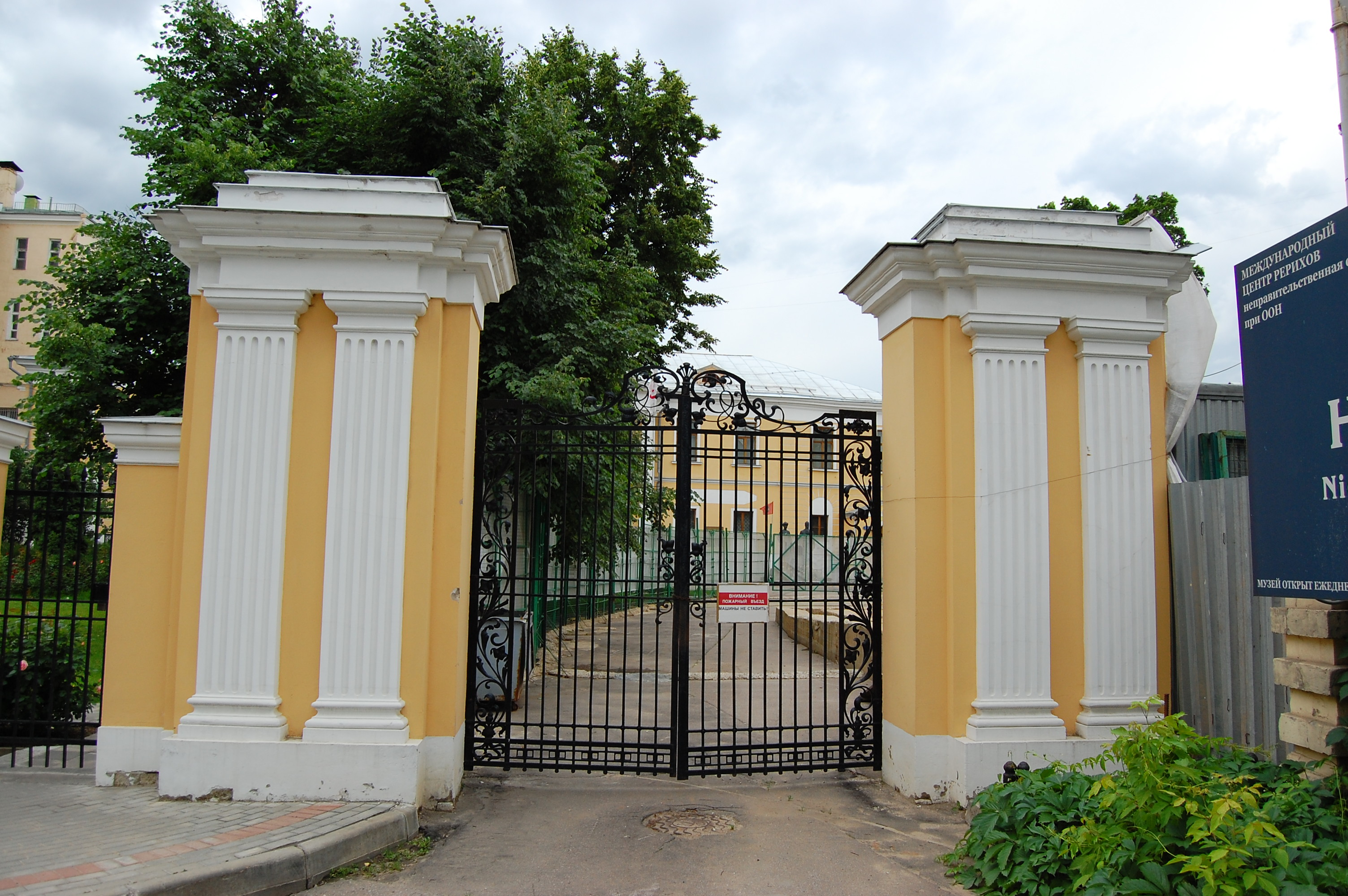 Усадьба Лопухиных